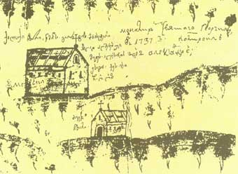 ჩხარის წმიდა გიორგისა და მაცხოვრის ეკლესიები (ფრაგმენტი ქუთათელ მთავარეპისკოპოსის ტიმოთე გაბაშვილის 1737 წლის იმერეთის რუკიდან)